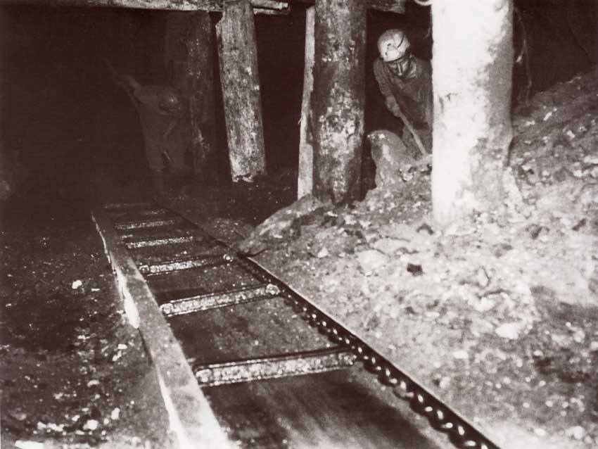 Rucni utovar ugljena na otkopu